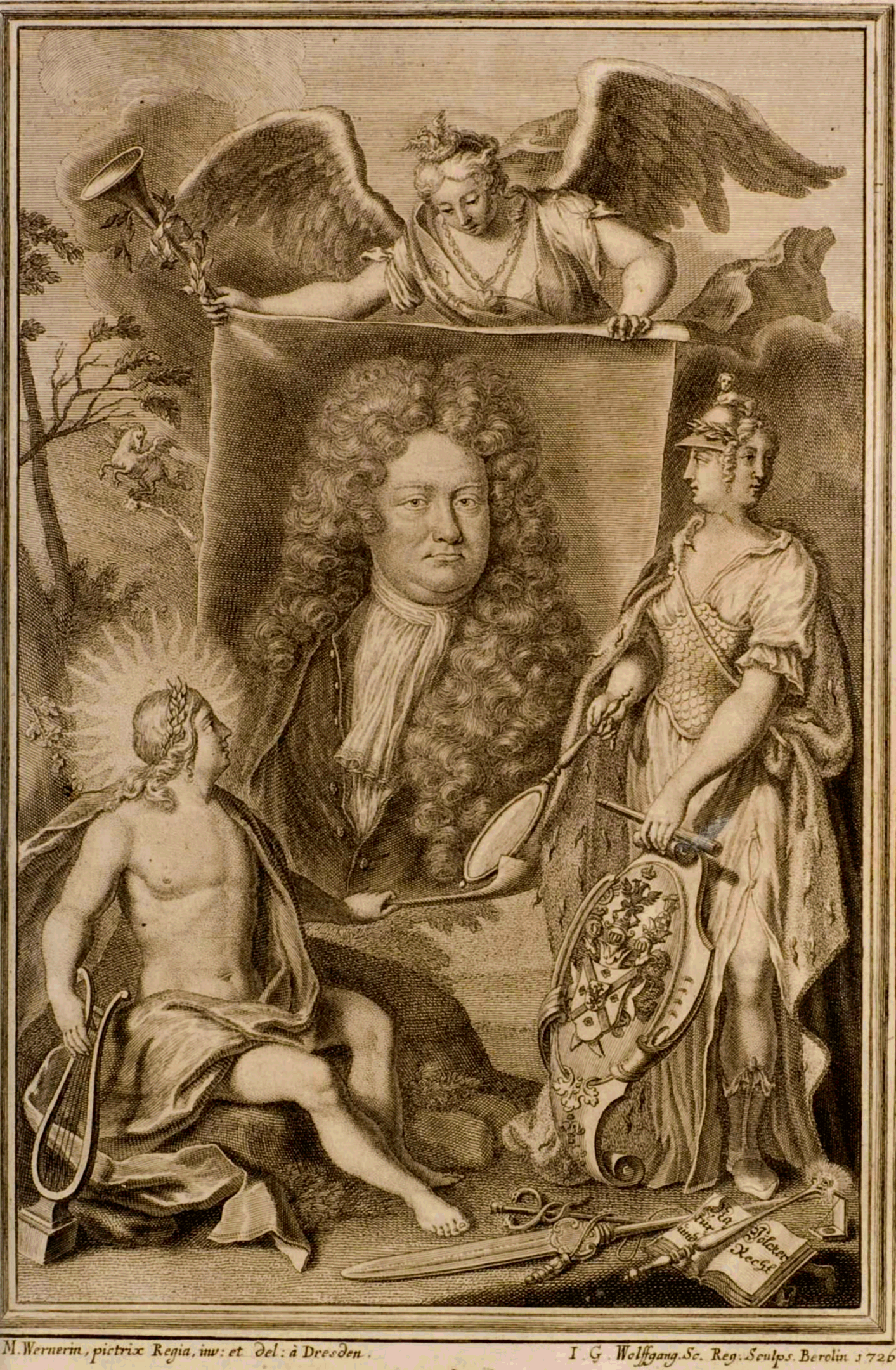 Friedrich Rudolf Ludwig von Canitz (Frontispiz)